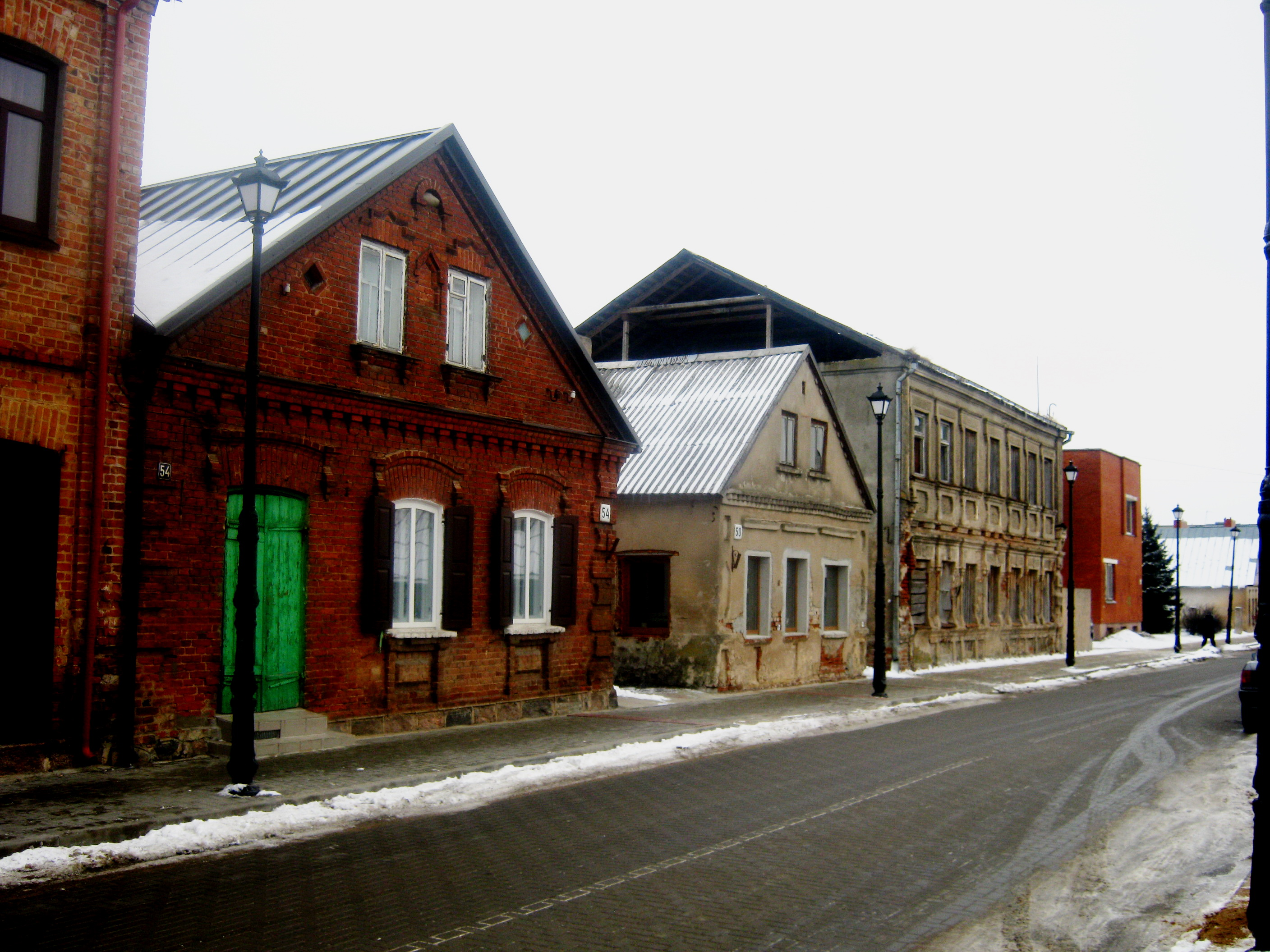 Kauno gatvė Jonavoje